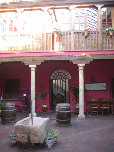 Patio cubierto del museo del vino de Ronda, Málaga, España